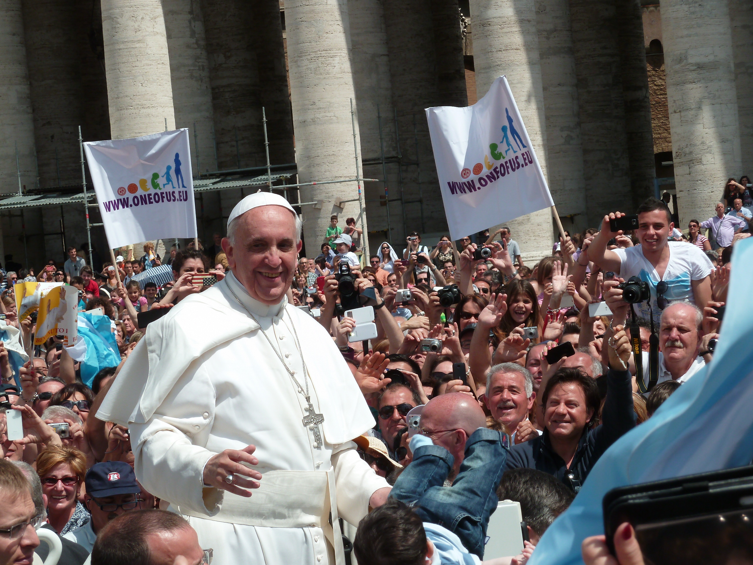 Seguramente muchos habrían querido estar en mi lugar para ver al Sr. Bergoglio repartiendo saludos, besos y mensajes anti-aborto.